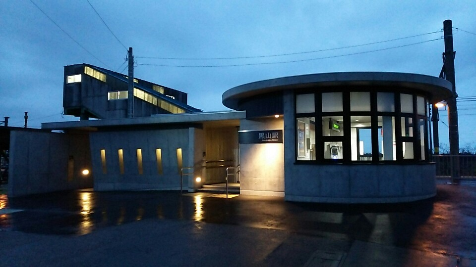 黒山駅の駅舎の写真です。